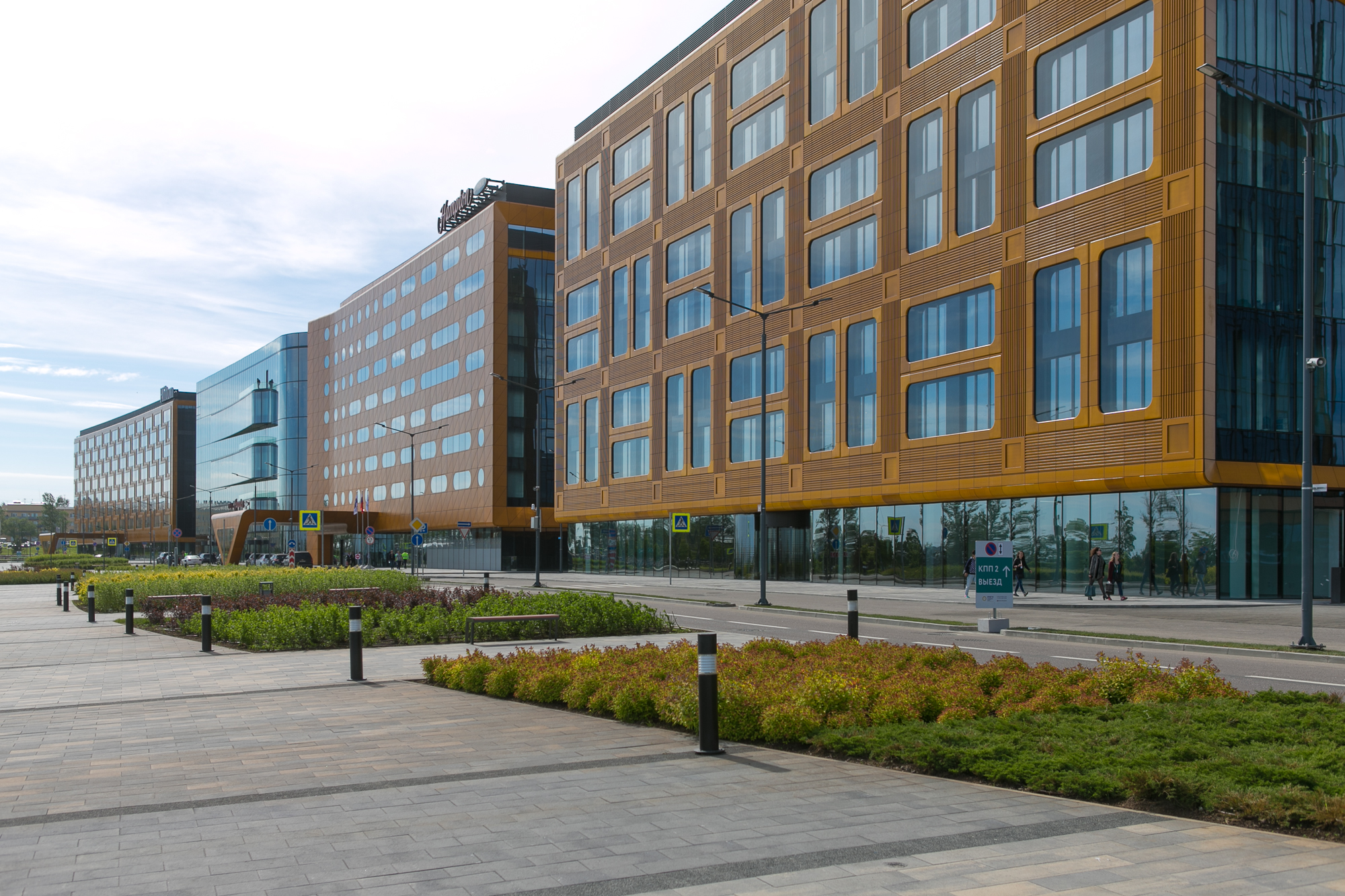 Вид с Петербургского шоссе на конгрессно-выставочный центр Экспофорум